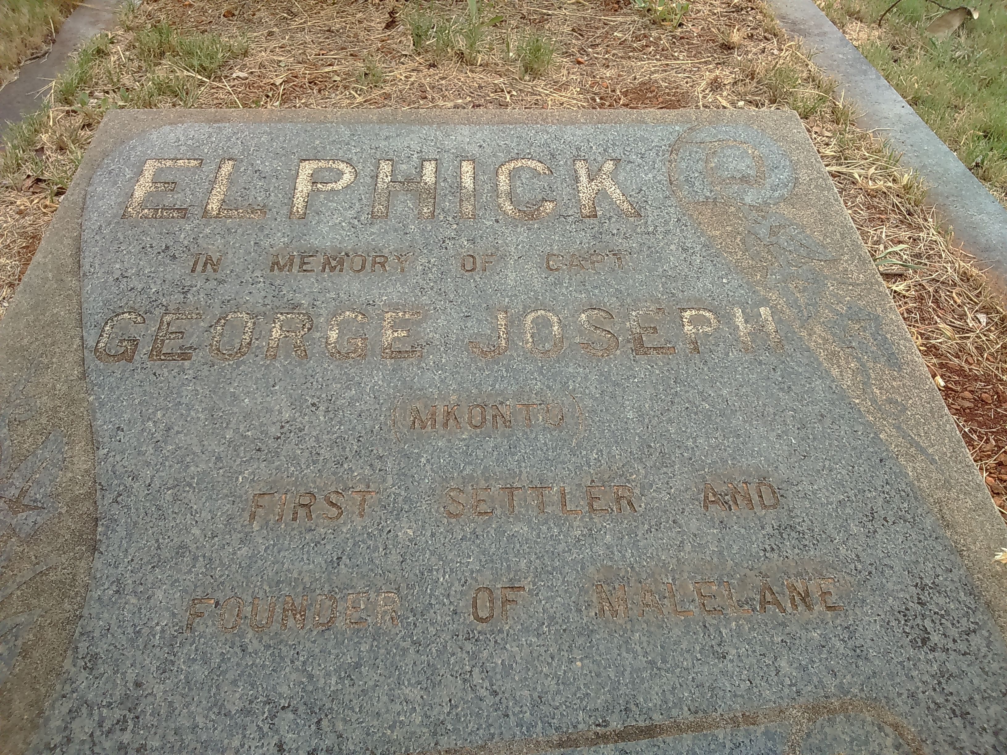 Grafsteen van Kapt GJ Elphic te Malelane. Tombstone of Capt GJ Elphic in Malelane, Mpumalanga